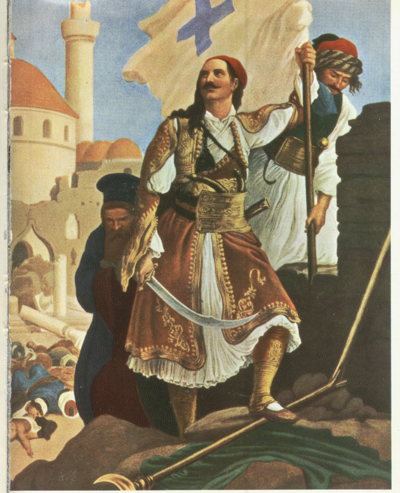 Ο οπλαρχηγός Παναγιώτης Κεφάλας. «Ο Κεφάλας σηκώνει τη σημαία της ελευθερίας στα τείχη της Τριπολιτσάς»